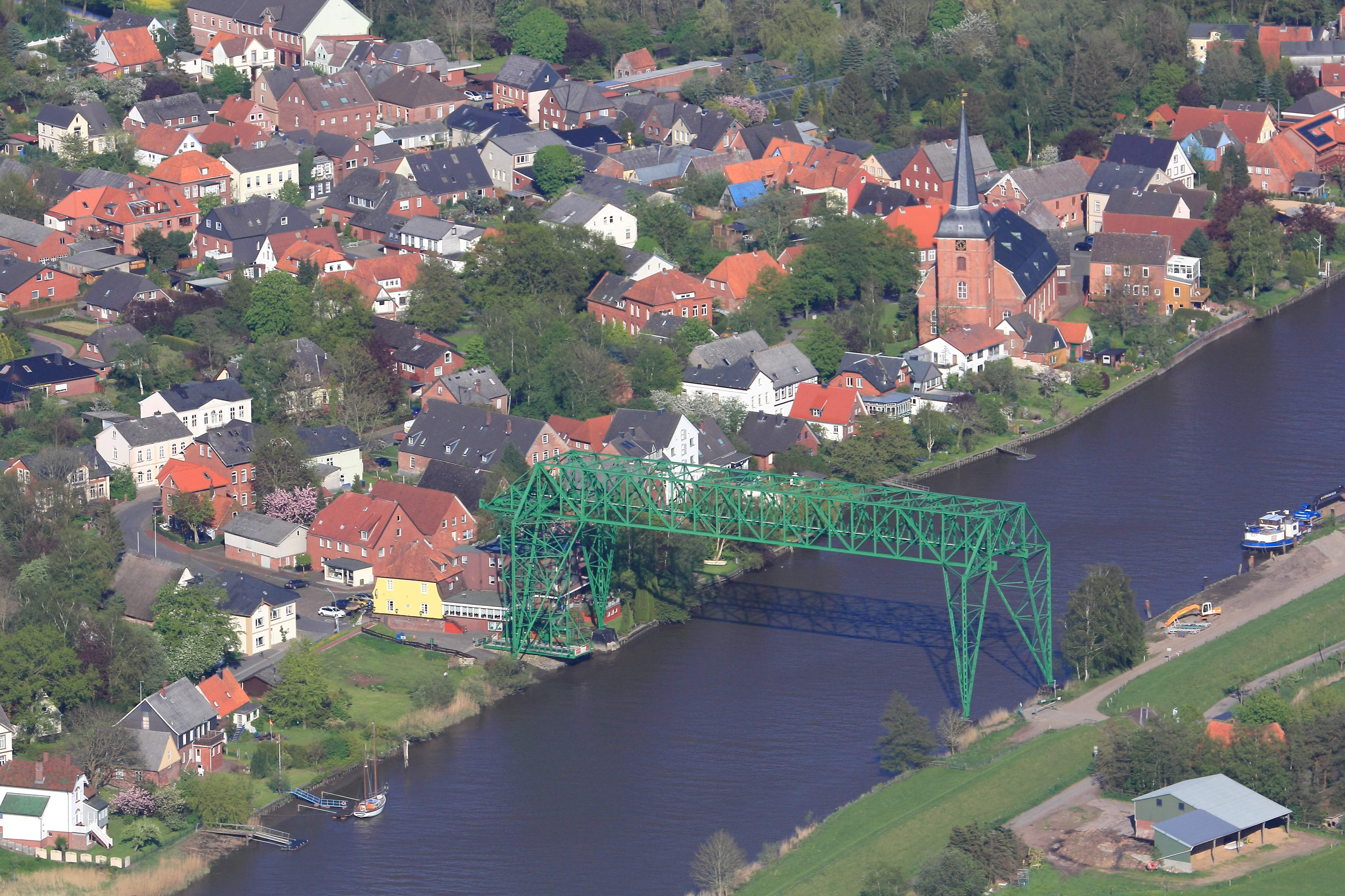 Luftaufnahme: Osten mit Schwebefähre